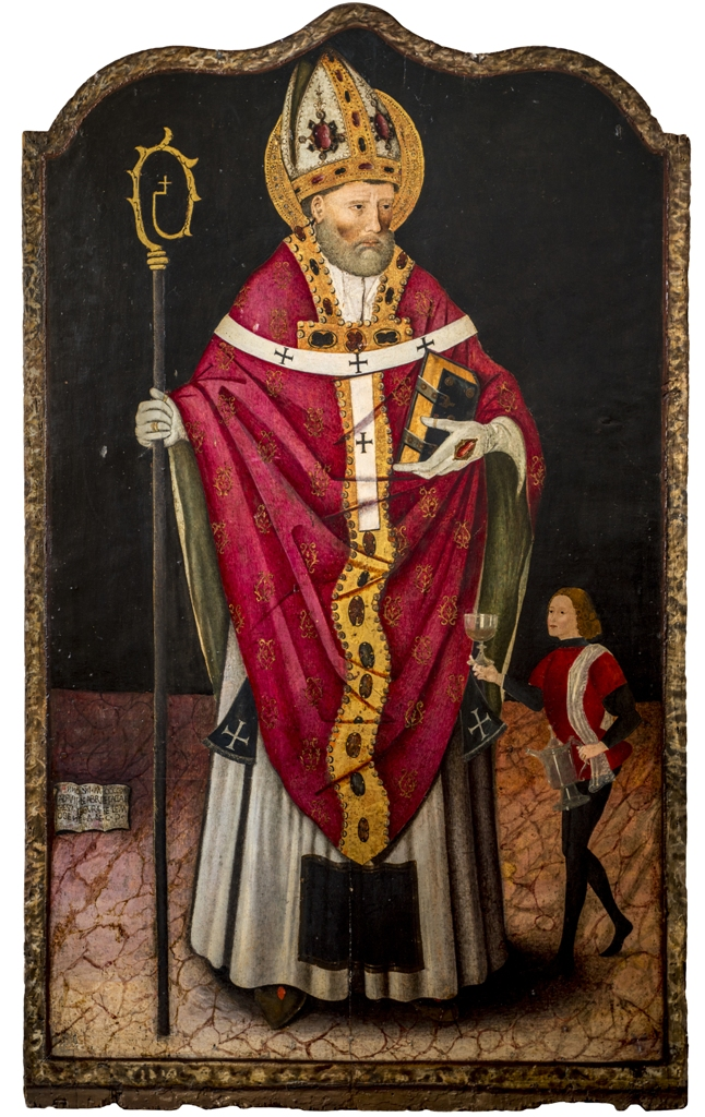 "San Nicola di Bari" autore anonimo - dimensioni (110 x 180 cm) - olio su tela. Opera proveniente dalla Chiesa di Santa Maria in Cosmedin di Napoli